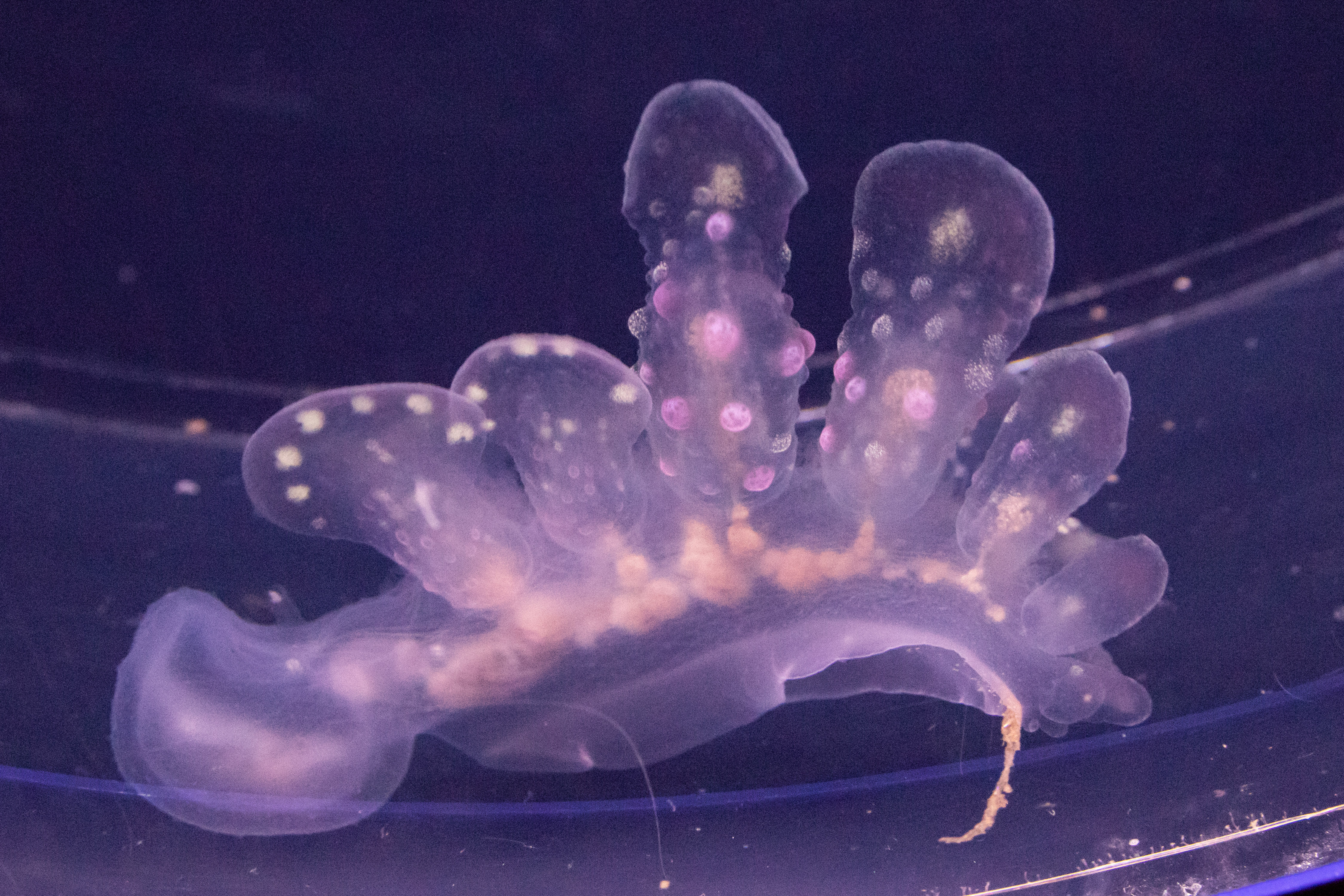 ヤマトメリベ (学名:Melibe japonica) 撮影地：新江ノ島水族館